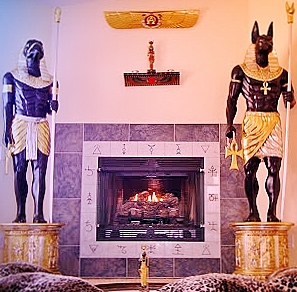 Gran Sala de Recepciones del Templo Madre de la Orden Rosacruz de Alpha et Omega